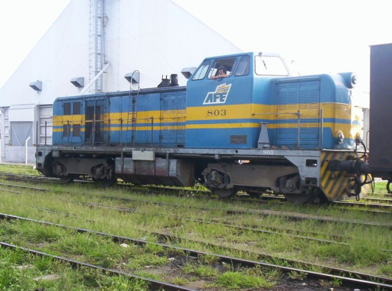 Locomotora marca Alsthom Nº 803 de la Administración de Ferrocarriles del Uruguay (A.F.E.)